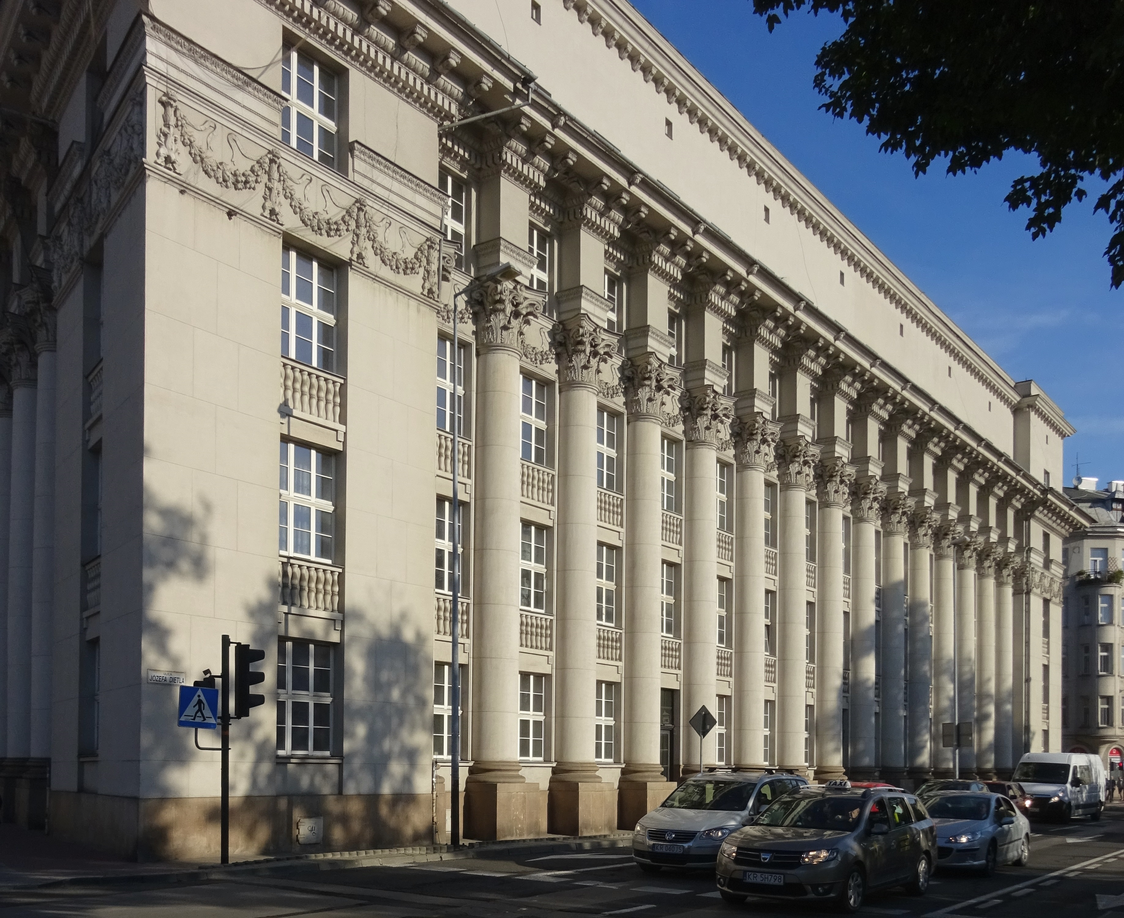 Gmach PKO w Krakowie. Widok od południowego wschodu, od strony ulicy Józefa Dietla. 2019